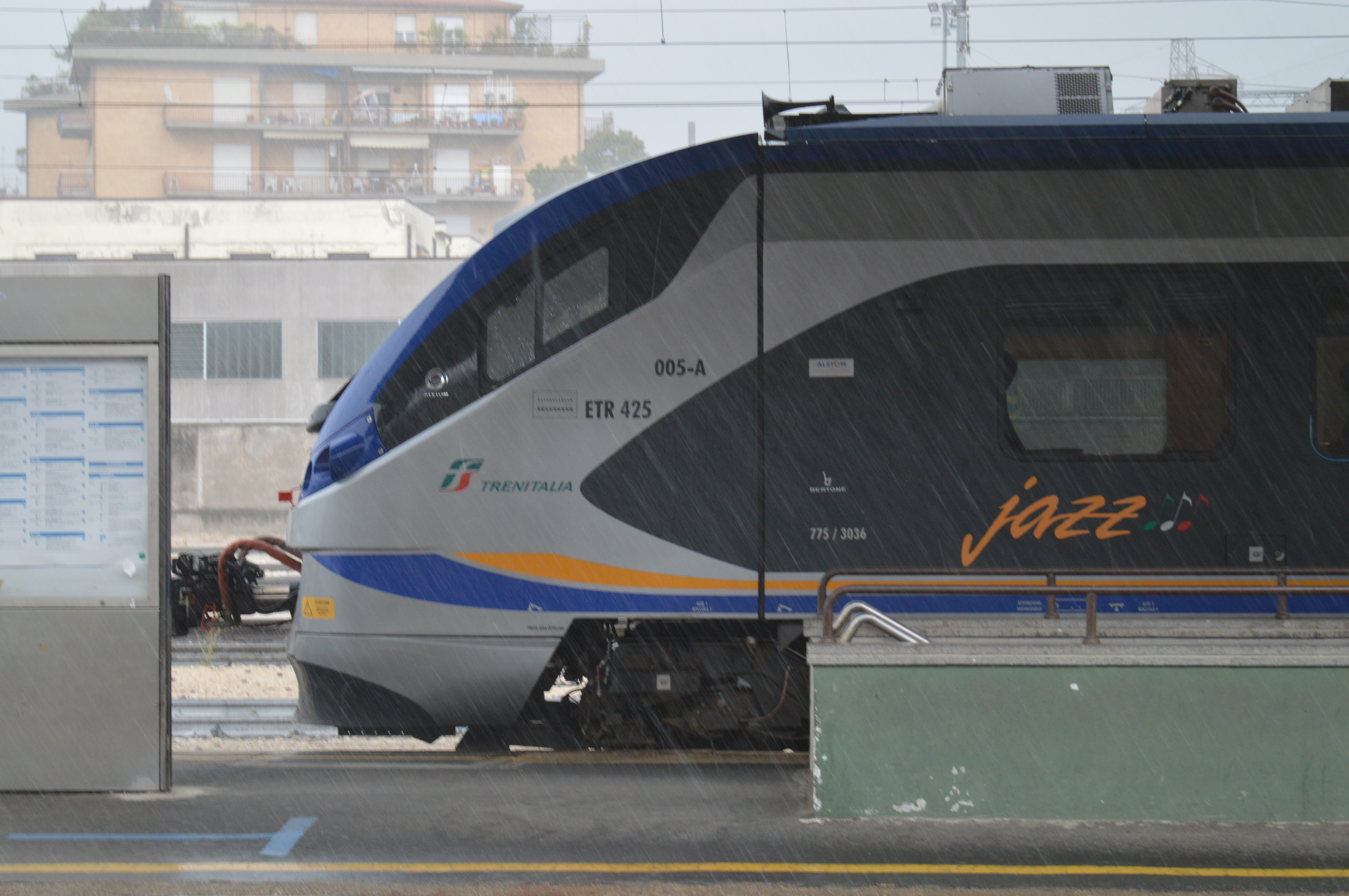 ETR 425 in sosta al binario 5 della stazione di Foligno, sotto il temporale.